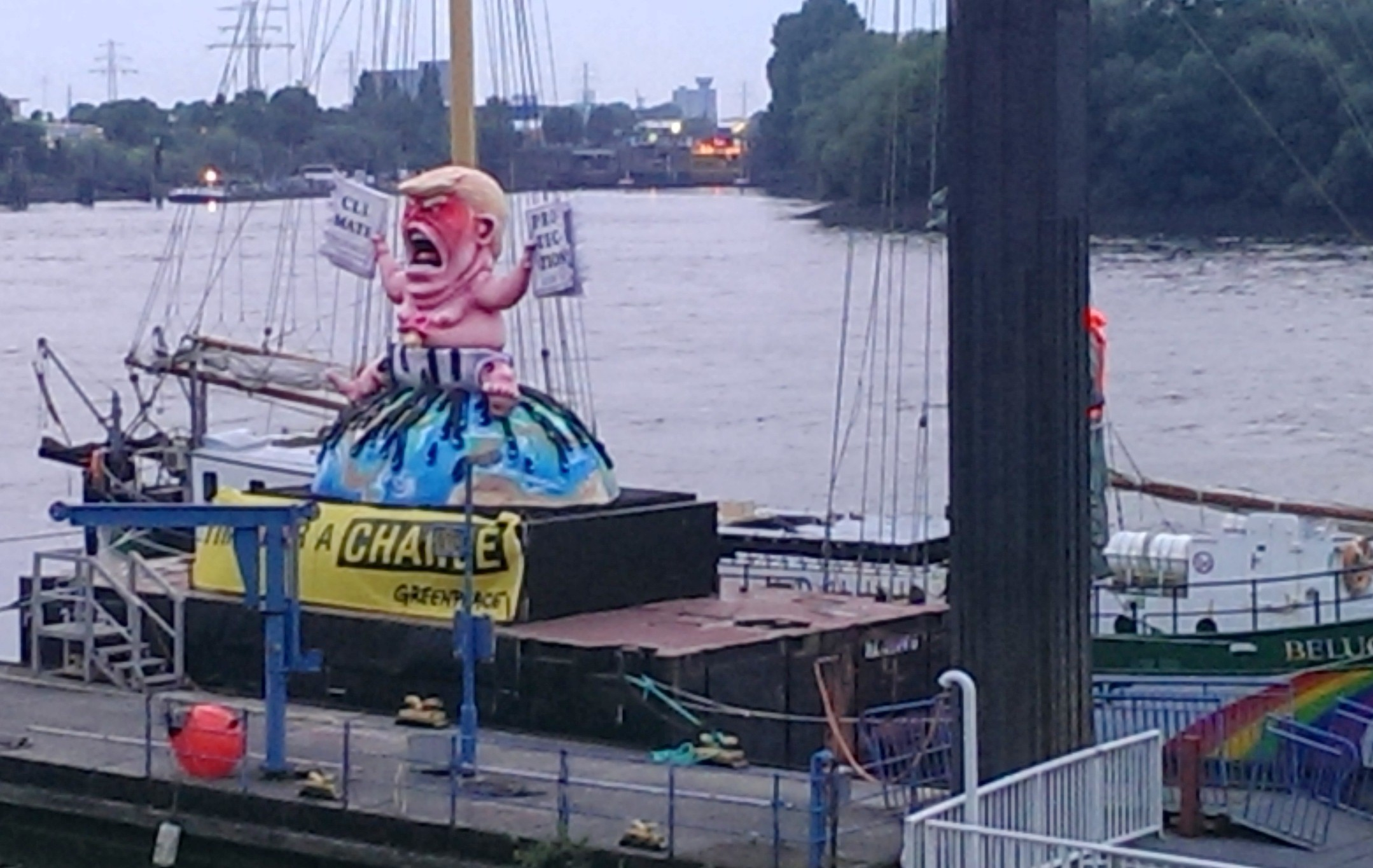 Der Greenpeace-Klipper "Beluga II" mit einer Schute, die eine Pappmachéfigur Donald Trumps auf einer Weltkugel trägt, nach der Beschlagnahmung während des G20-Gipfels in Hamburg im Juli 2017 am Wasserschutzpolizeikommissariat 3 in Hamburg-Harburg